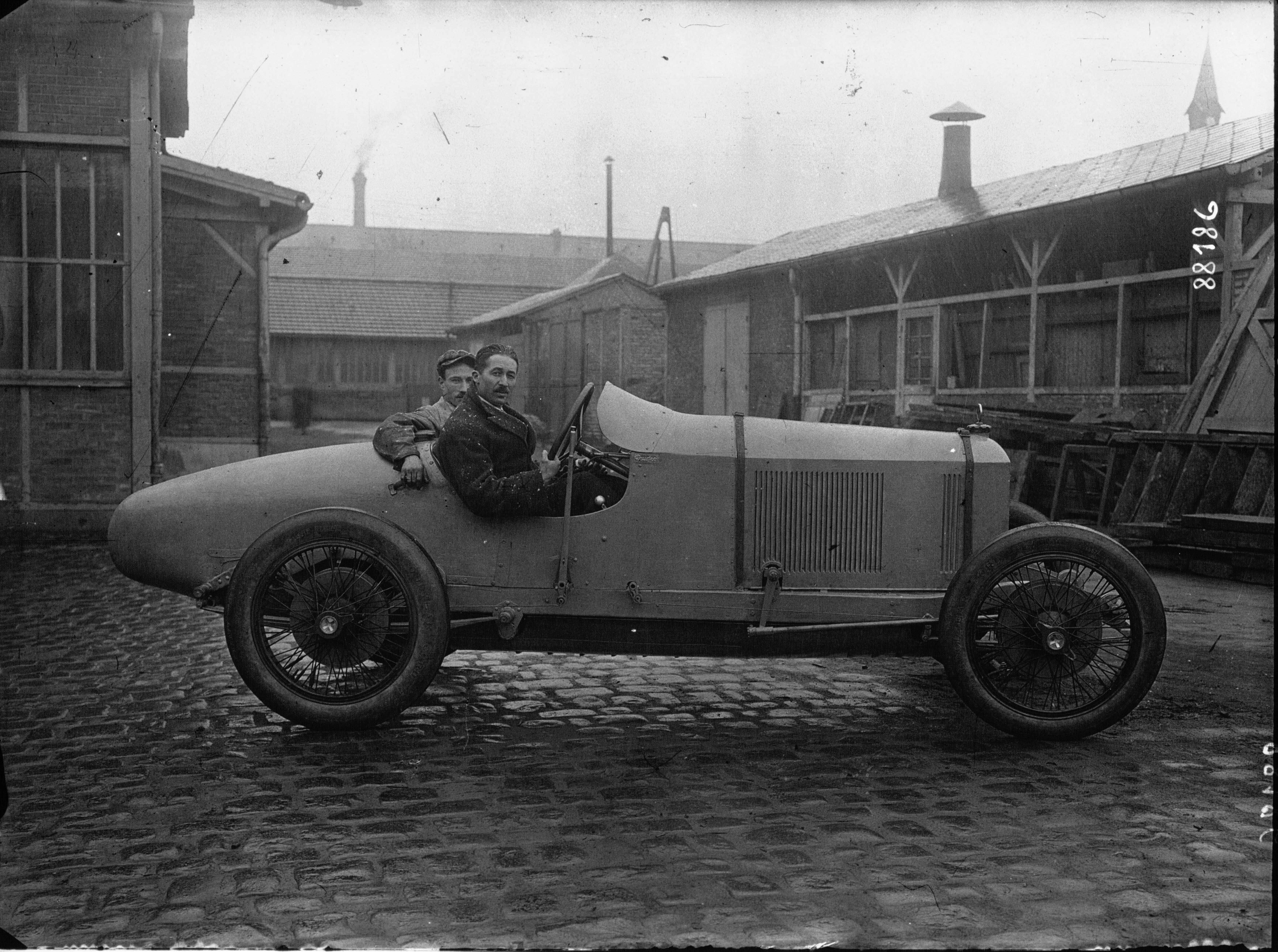 Voiture automobile Peugeot (de course), qui doit courir à Indianapolis.